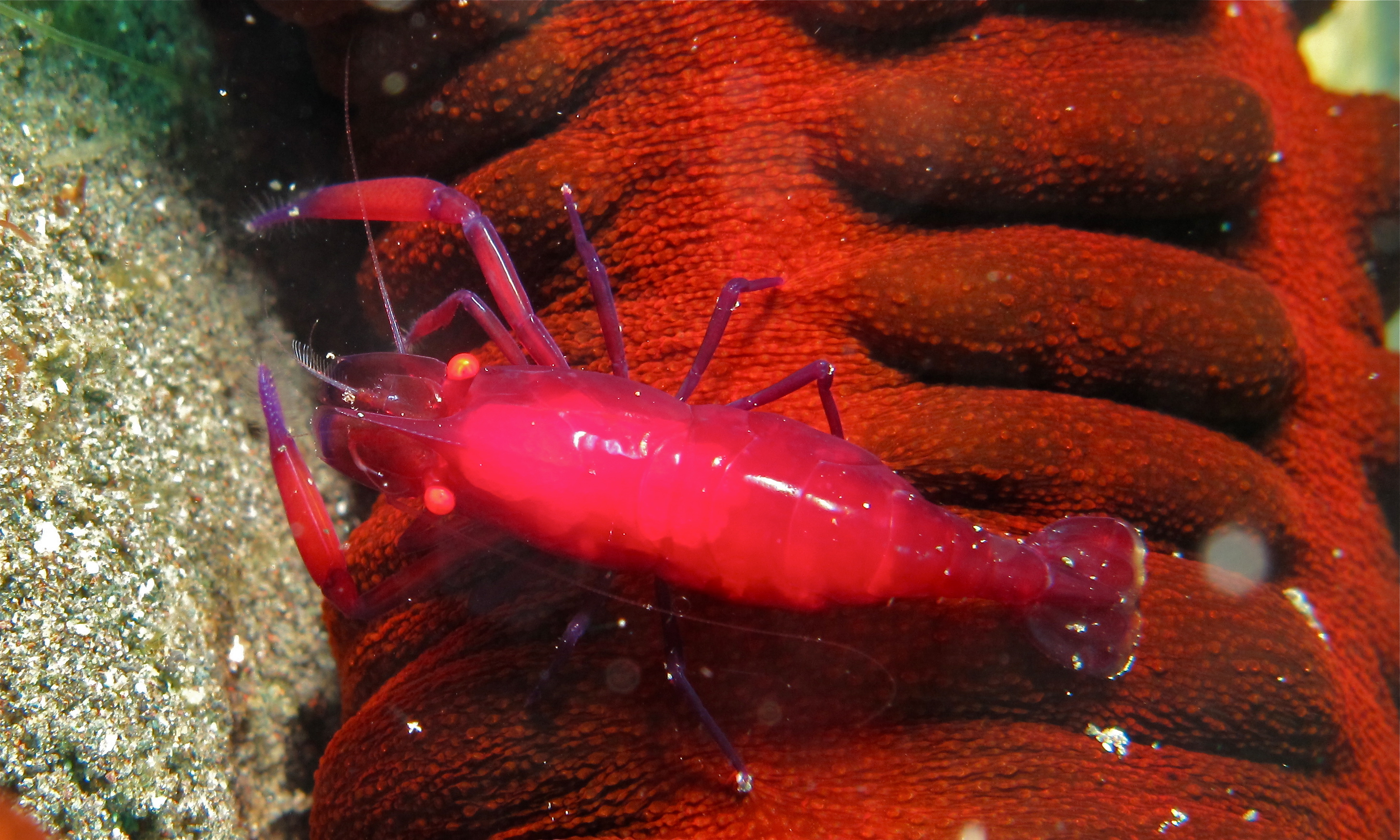 Tanjung Tebal, Lembeh Strait, Sulawesi, INDONESIA